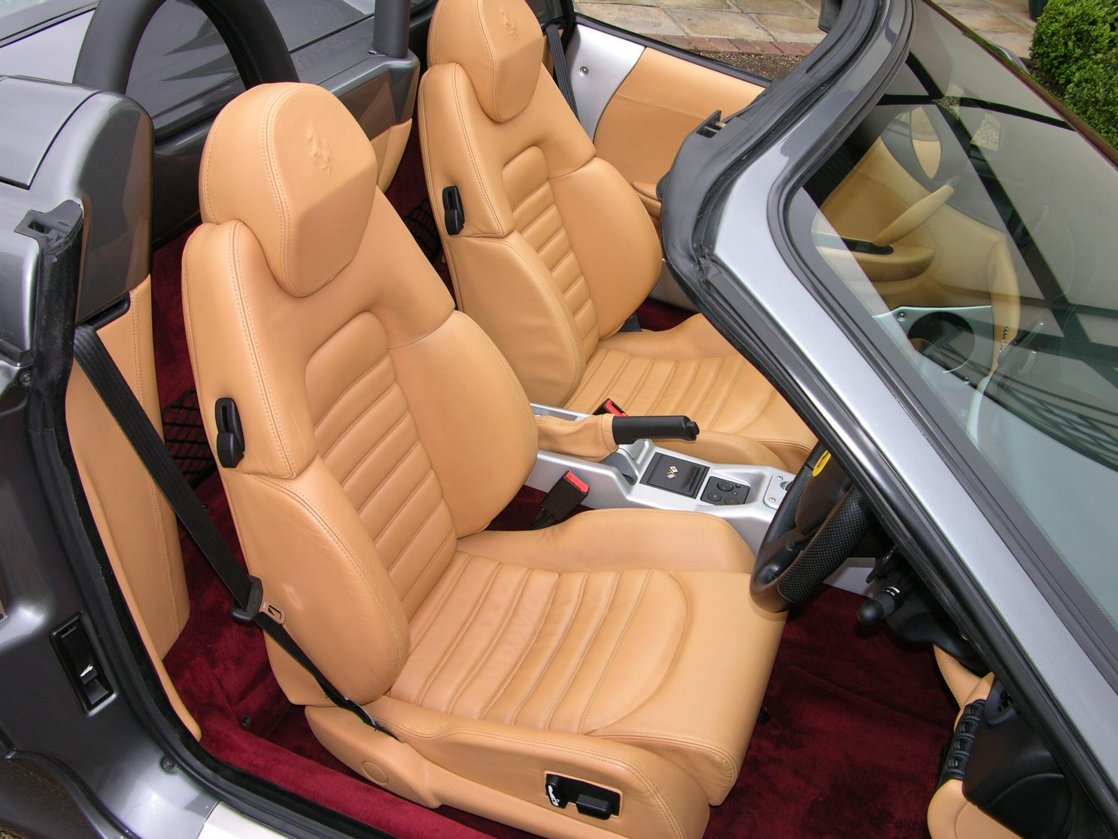 Ferrari 360 Spider F1